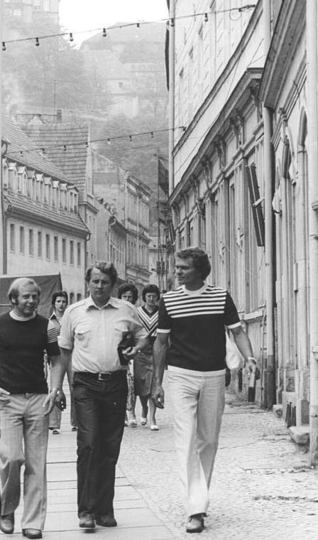 ADN-ZB Sturm / 18.6.1979 / Zum Beitrag: Canaletto malte es ein Dutzend Mal Schon mancher kam mit der "Pirna" in Pirna an. So zeigt sich Pirna im Juni 1979. Die reizvolle alte Stadt lockt immer viele Besucher an. (Beachten Sie hierzu auch U0618-302-305+307N)